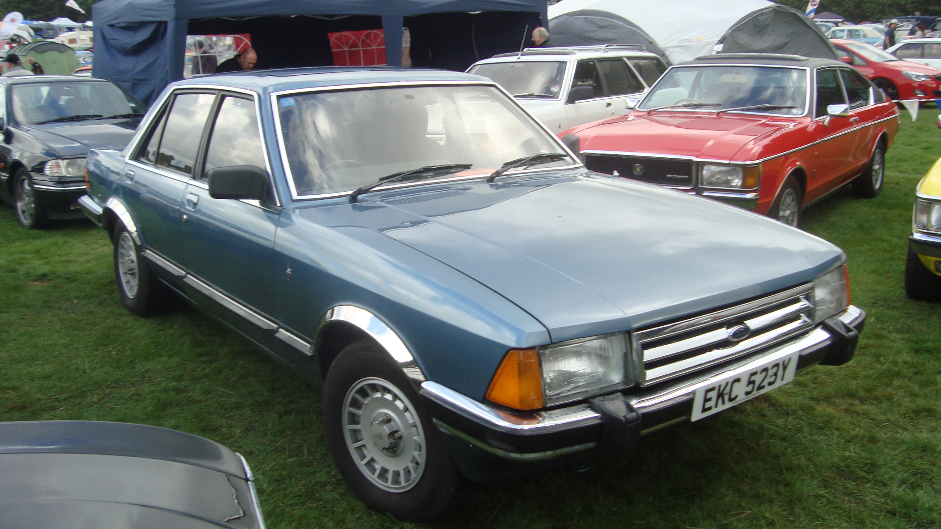 1982 Ford Granada 2.8 Ghia